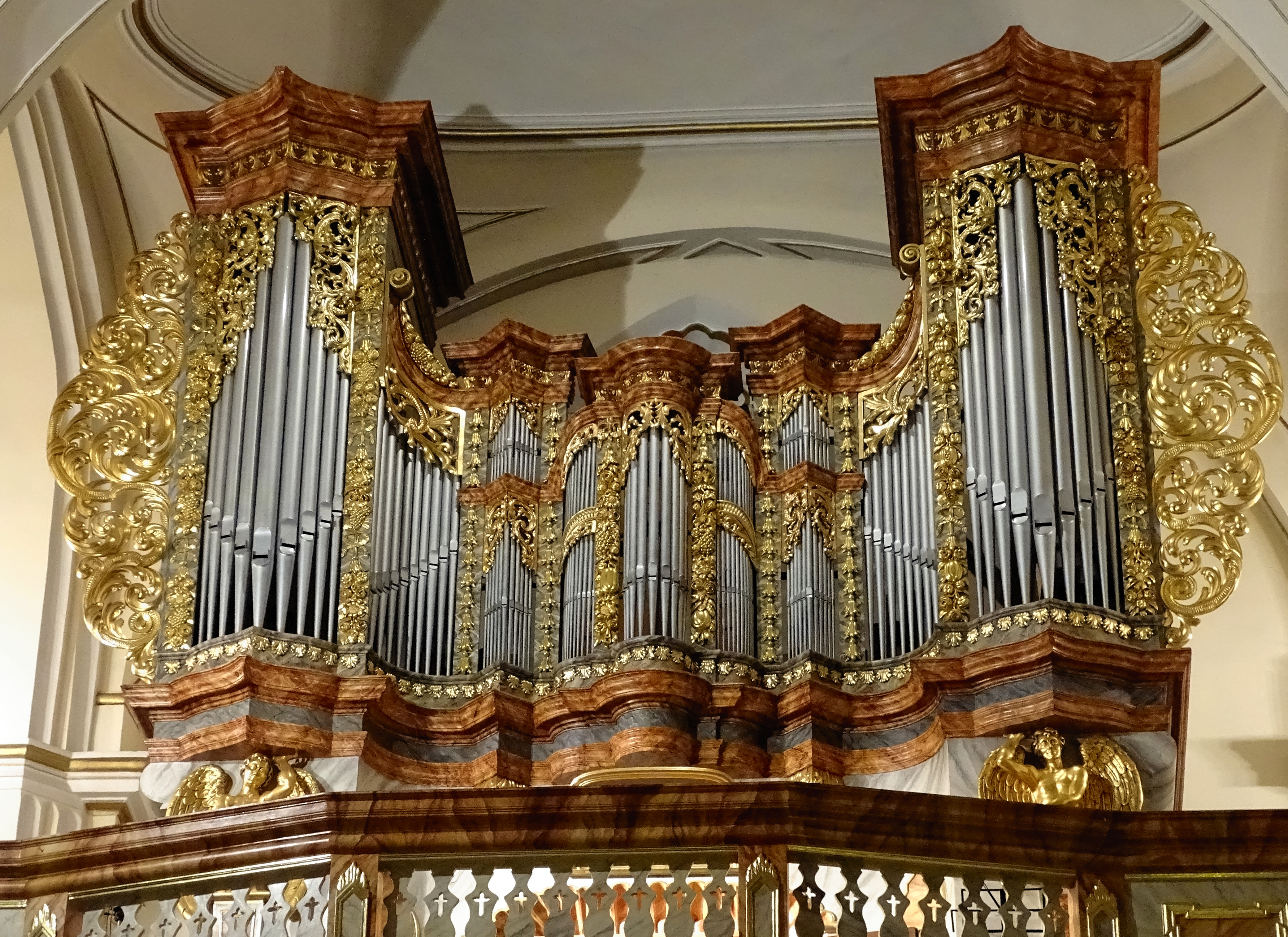 Organy Adama Horatio Caspariniego, kościół św. Wawrzyńca, Wołów